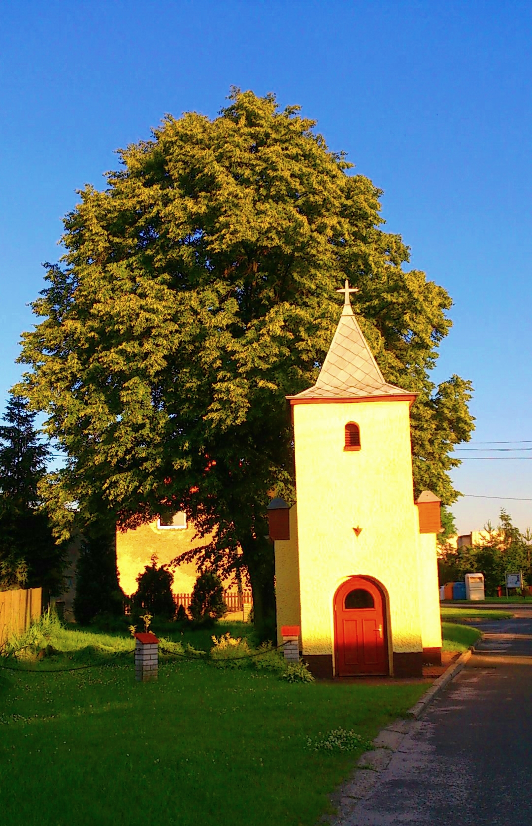 kapliczka nowowiejska w 2013 roku